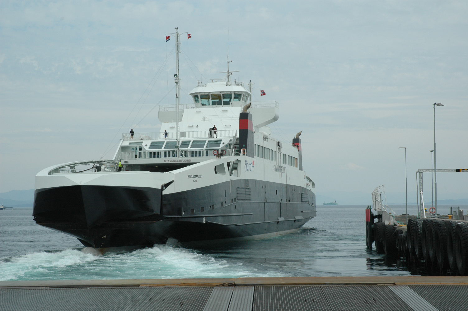 MS Stavangerfjord IMO Number: 9344746 MMSI Number: 259386000 Callsign: LICY Length: 129 m Beam: 19 m